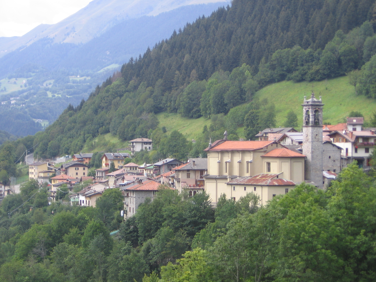 Azzone, Bergamo, Italy